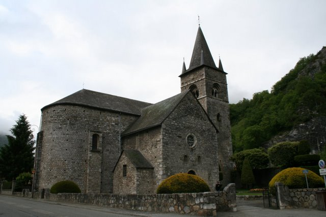 Eglise romane Saint-Ebons